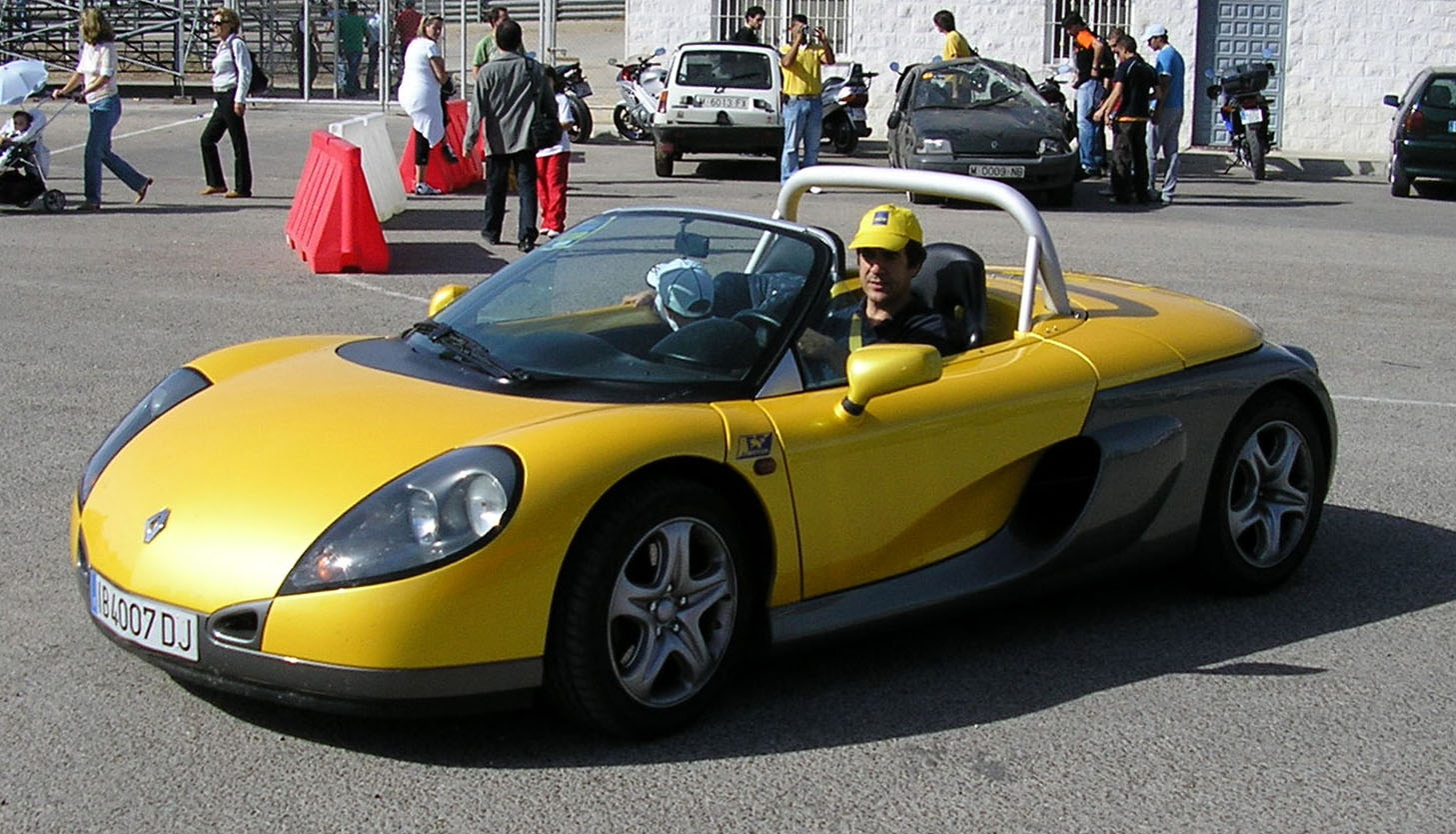 Renault Spider shown in Circuito del Jarama (Madrid). Jornada de puertas abiertas 2006.